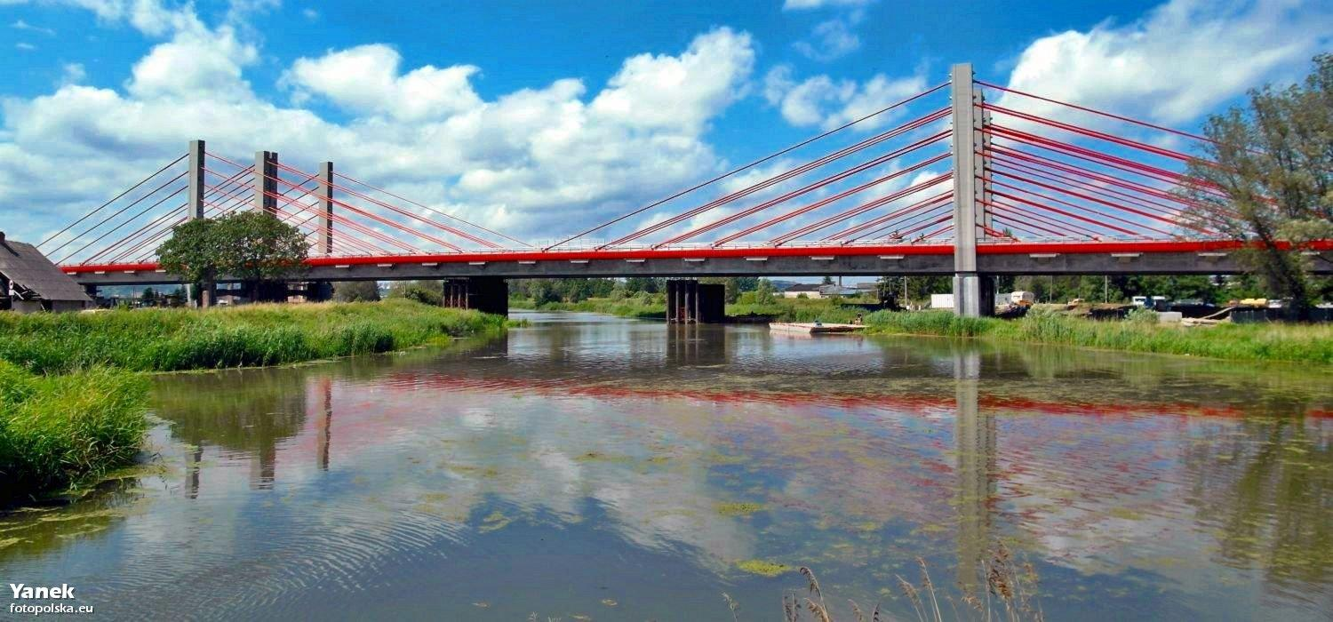 Most M-1 nad Motławą w ciągu drogi S7. Po lewej Orunia.